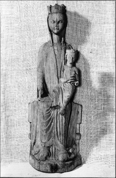 En medeltida skulptur, en madonna, finns bevarad. Både madonnan och barnet bär krona. Troligtvis från 1200-talet. Kategori: (05) SkulpturerEn medeltida skulptur, en madonna, finns bevarad. Både madonnan och barnet bär krona. Troligtvis från 1200-talet.